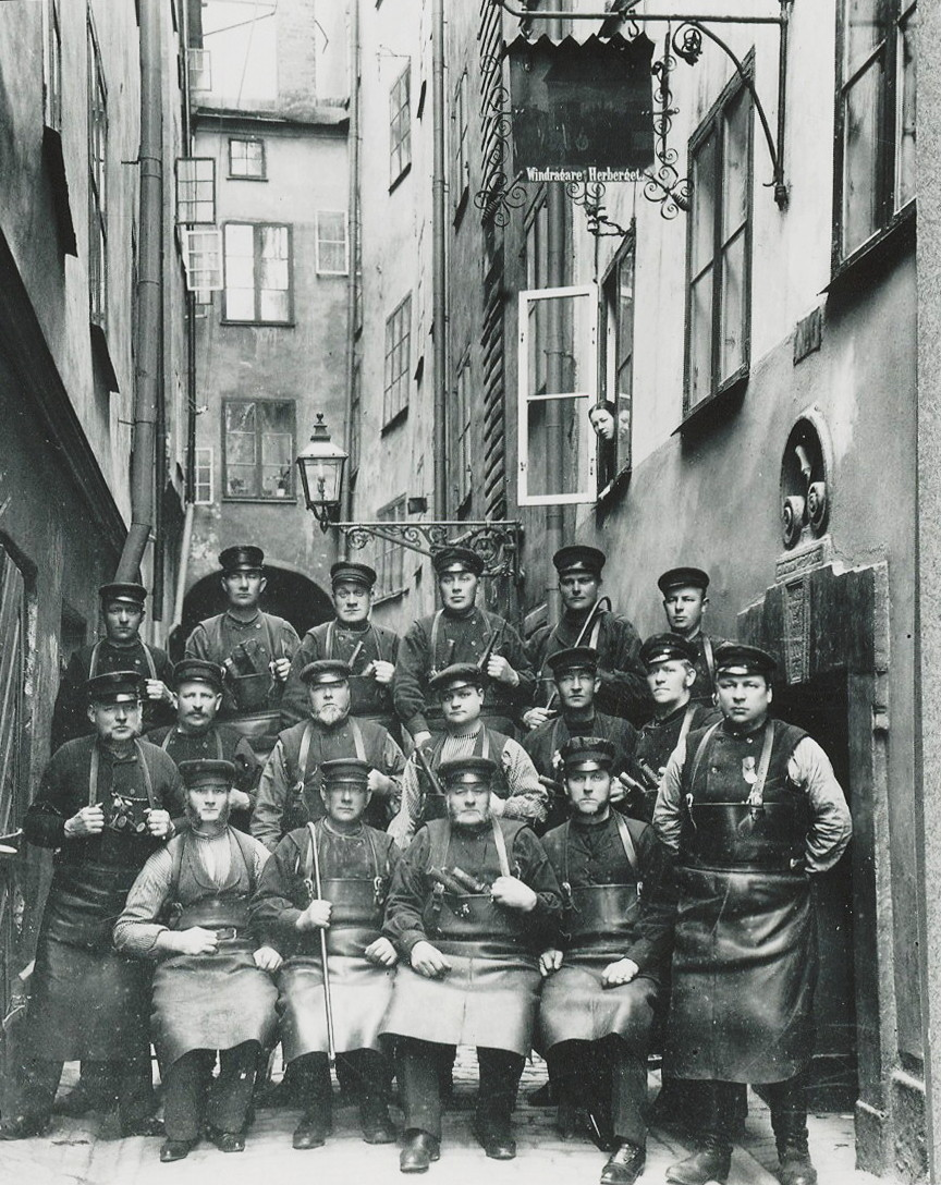 Här syns de sista vindragarna med förmannen Klas Henning Westerberg längst t.h. Vindragarlaget upplöstes 1930.